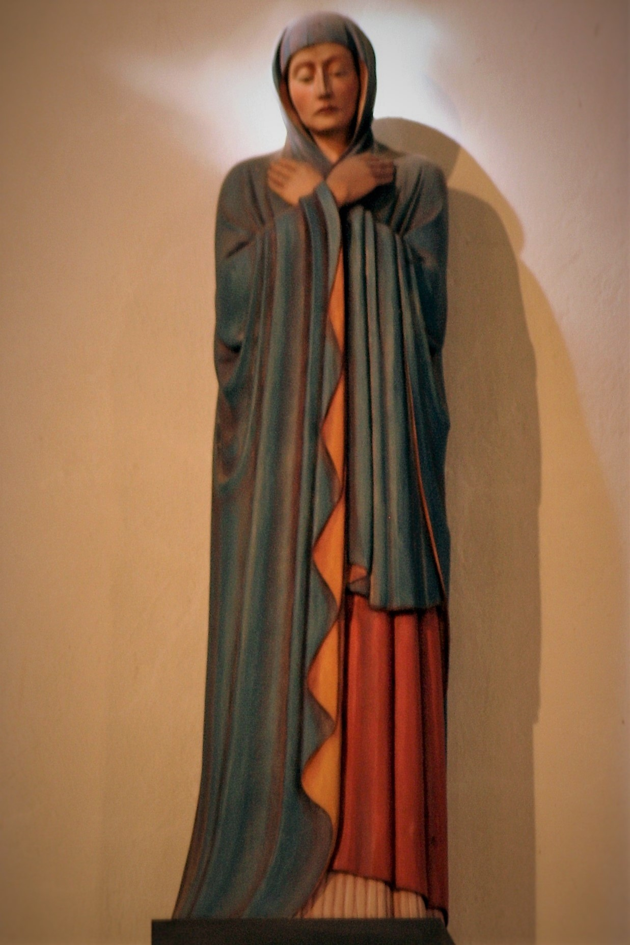 Diefflen, Pfarrkirche St. Josef und St. Wendelin, Sonnenaureole um das Haupt der Marienfigur der Kreuzigungsgruppe an Mariä Himmelfahrt